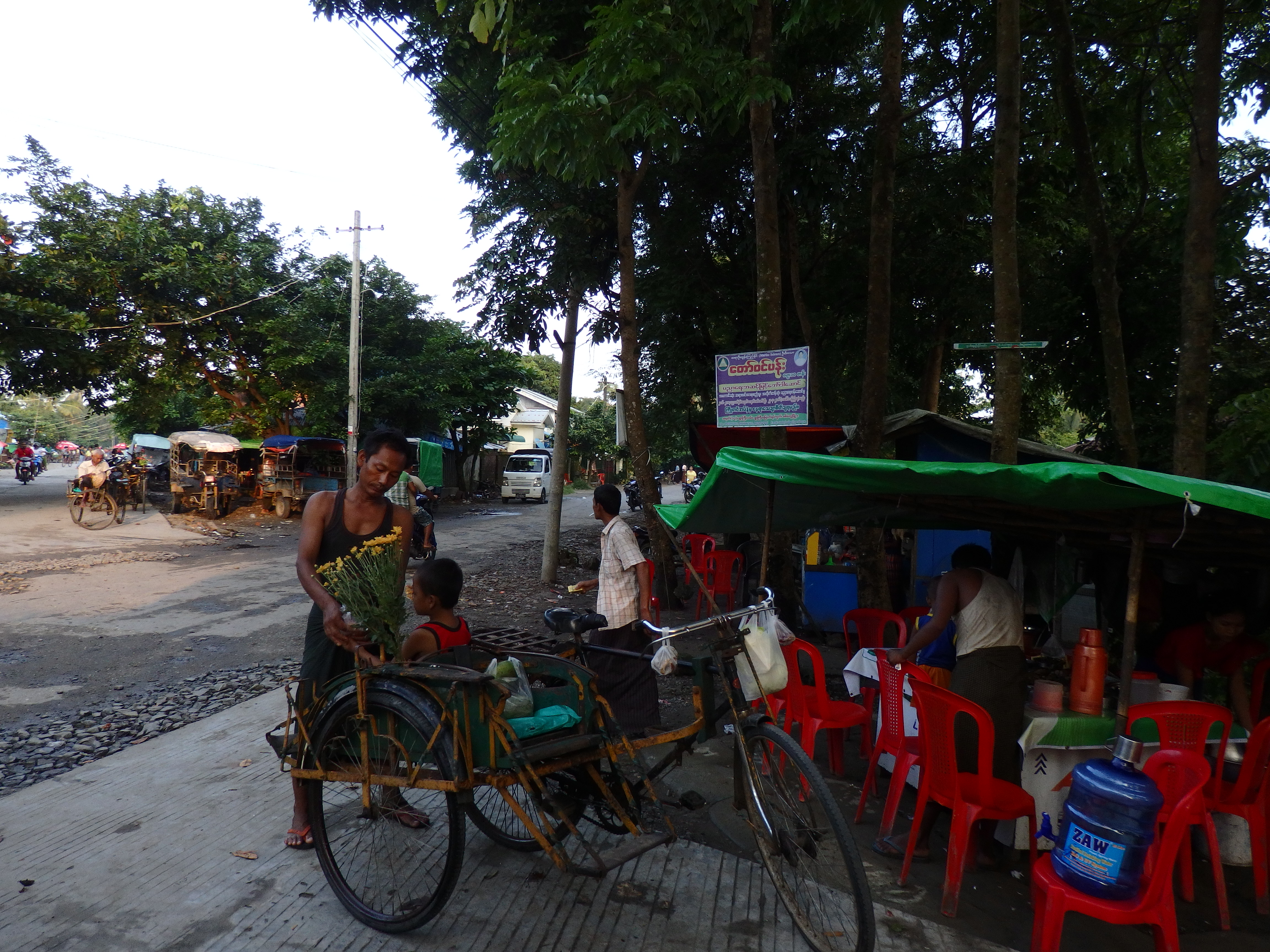 Buthidaung, Myanmar (Burma)